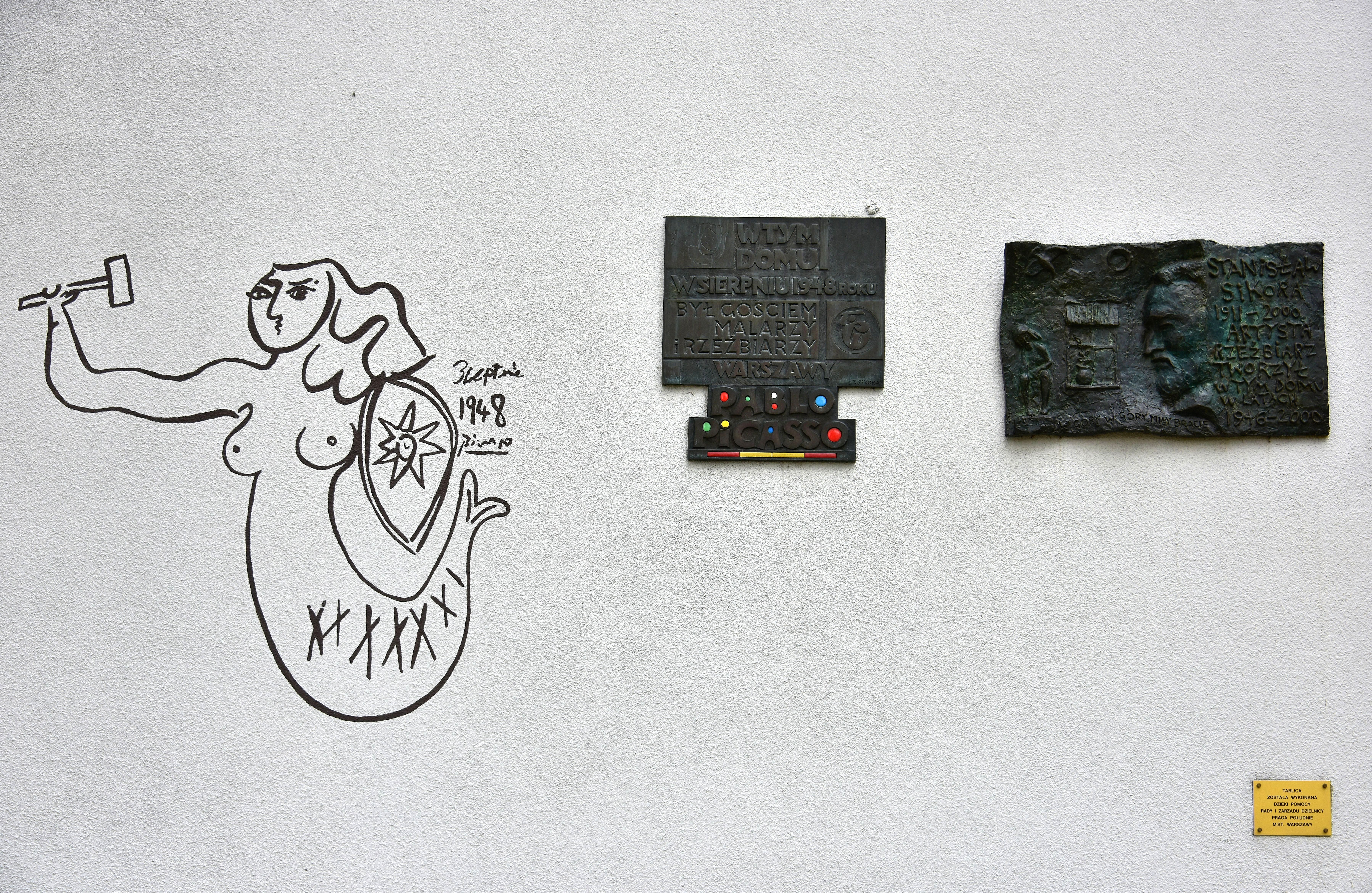 Tablica pamiątkowy i kopia Syrenki Pabla Picassa na budynku przy ul. Obrońców 28/30 w Warszawie